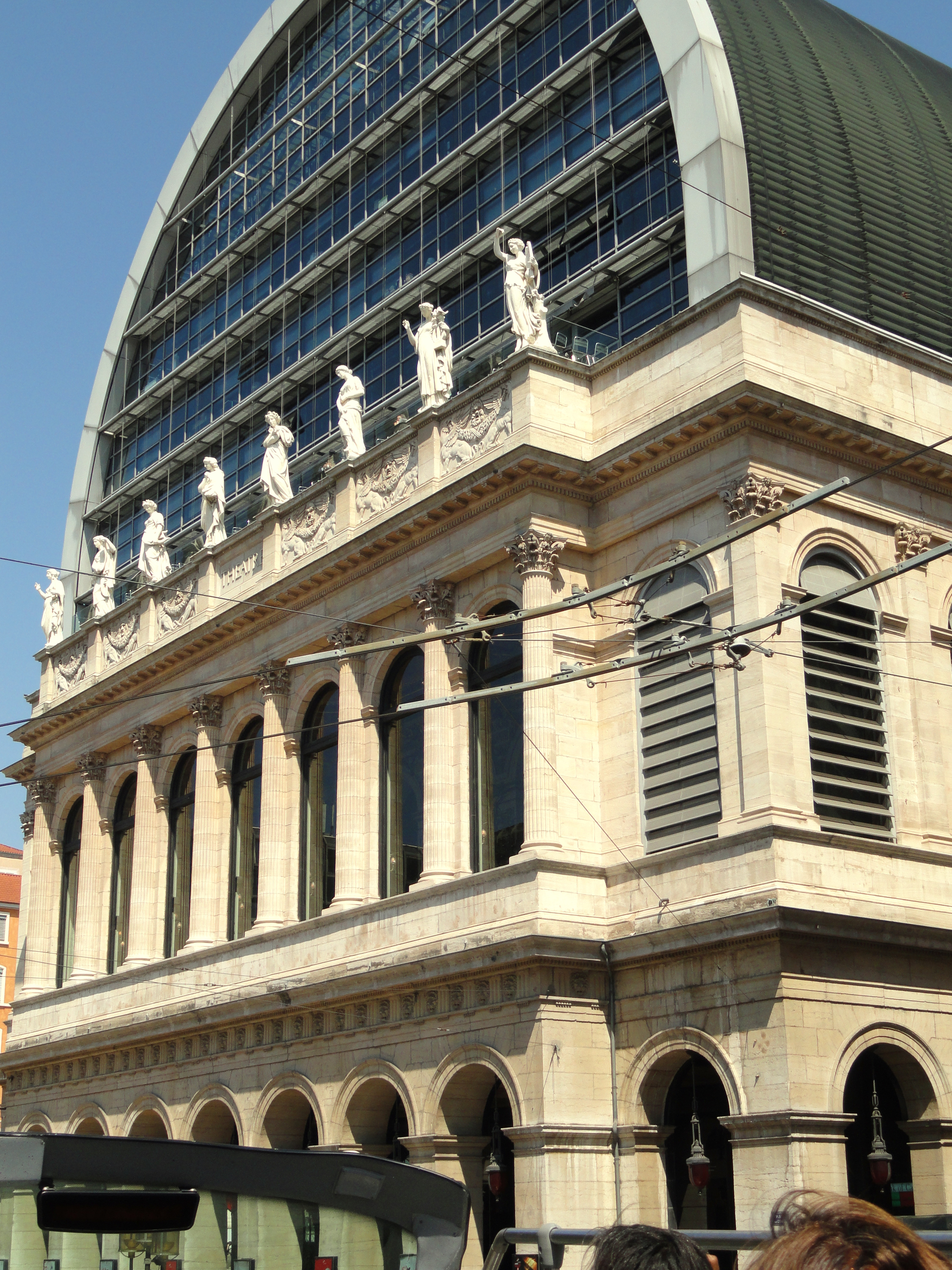 Opéra de Lyon, Lyon, France.